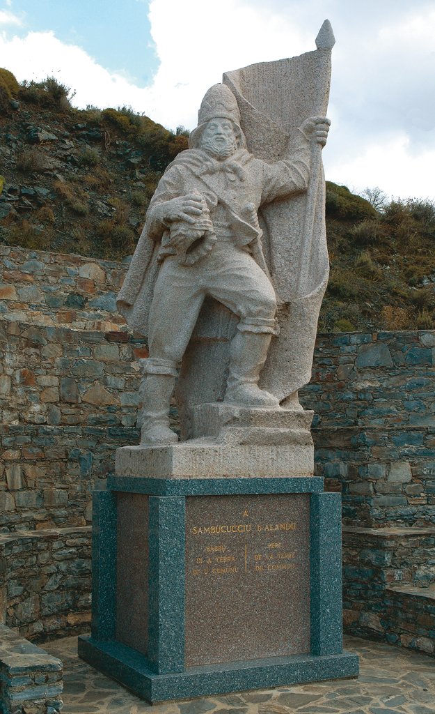 Corsu: Statua di Sambucucciu d'Àlandu sculpita da Noël Bonardi